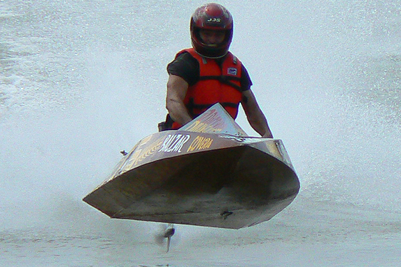 Regata Guayaquil Vinces. Juan Cornejo